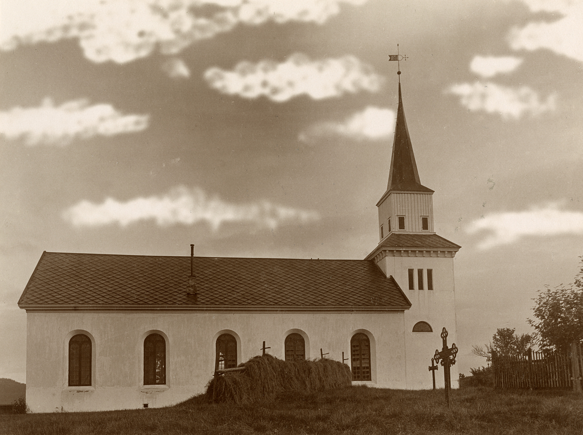 For kirke (iblant kalt Stod kirke) i Steinkjer kommune før den fikk sakristitilbygg i øst. Foto: Christian Christensen Thomhav, fra Kulturminnebilder.no